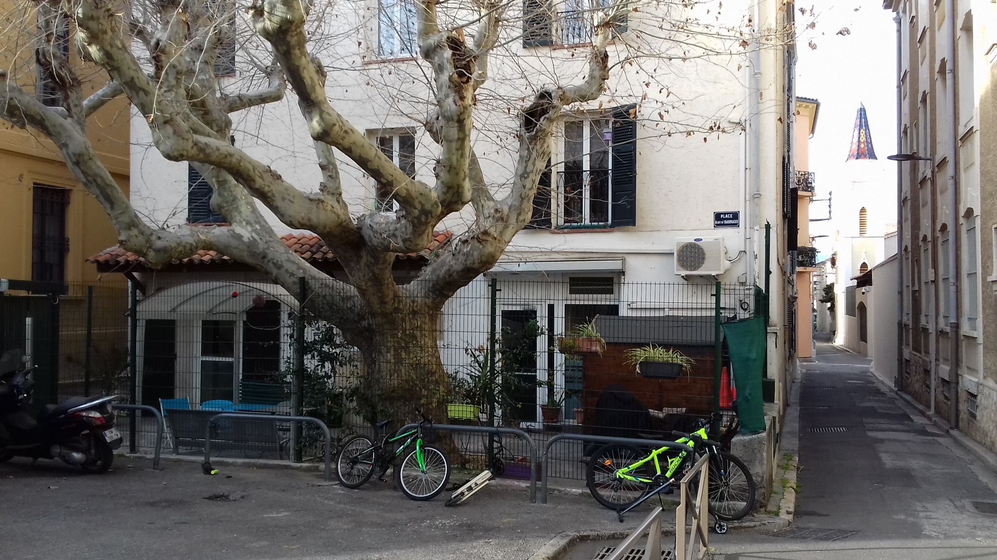 dans les rues d'Antibes